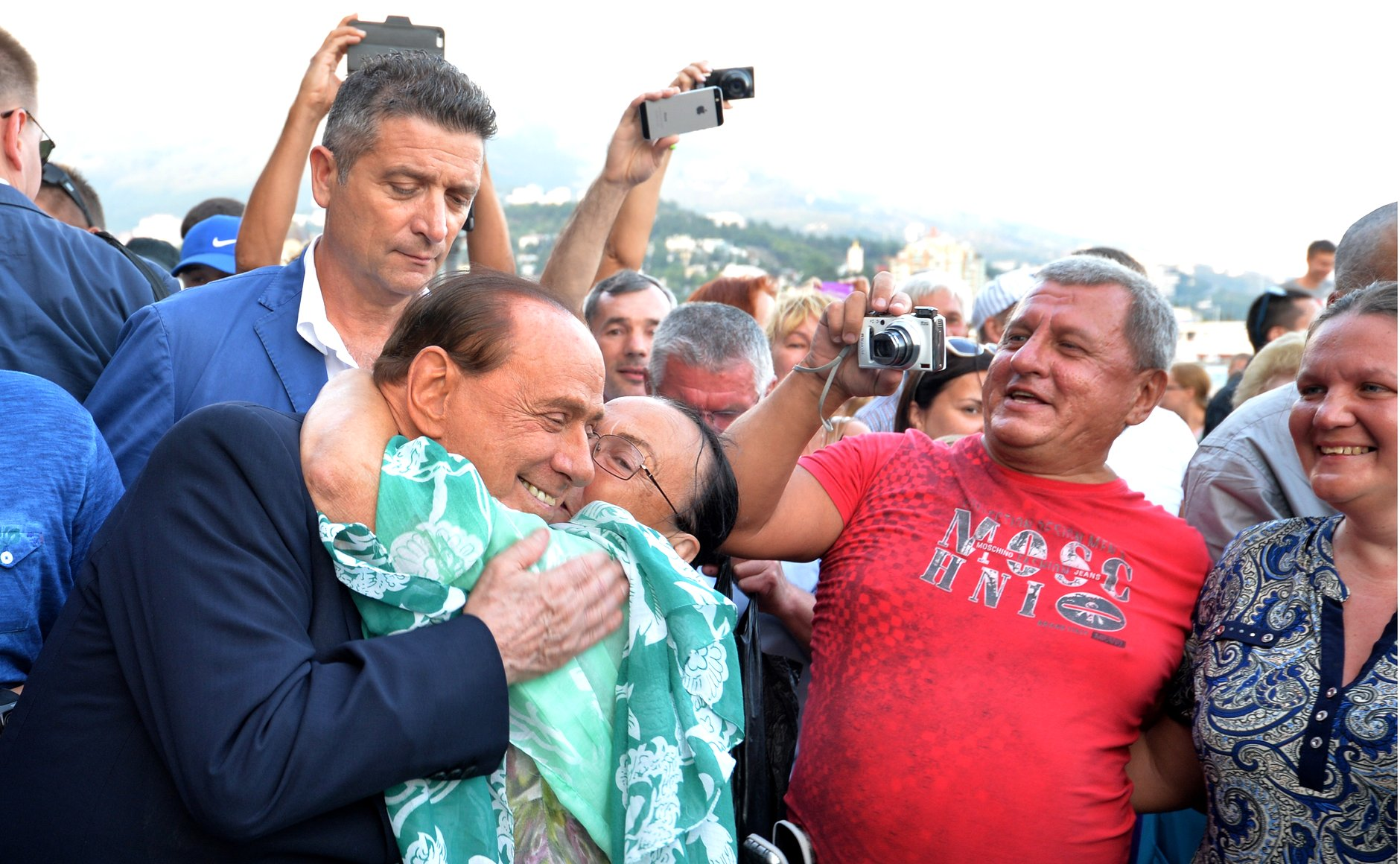 Владимир Путин встретился в Крыму с Сильвио Берлускони, находящимся в России с частным визитом